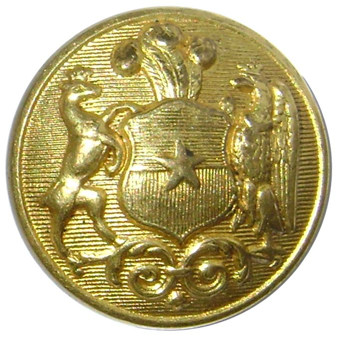 Botón perteneciente a un ejército